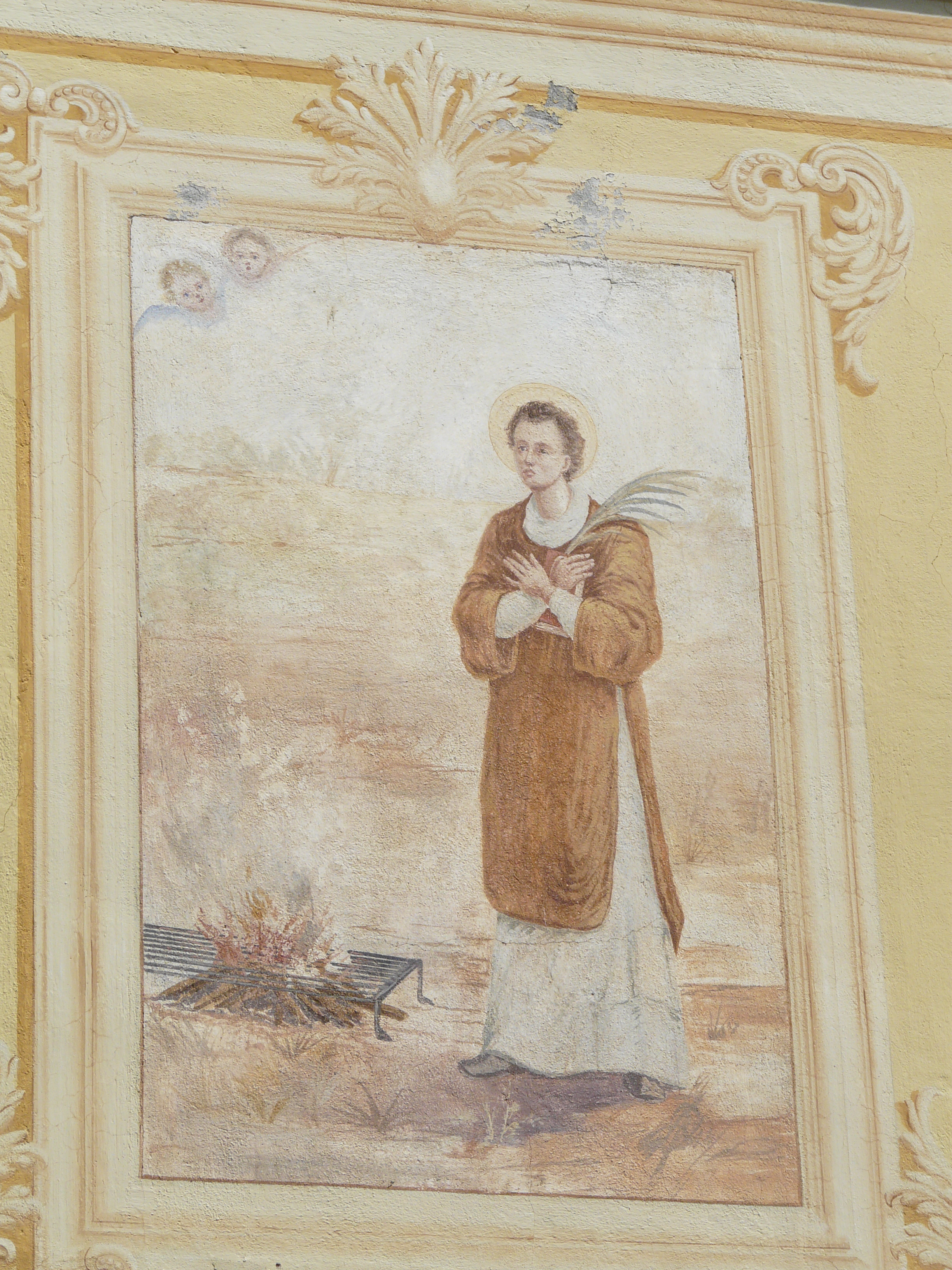 Dipinto della chiesa di San Lorenzo, Vescina, Avegno, Liguria, Italia